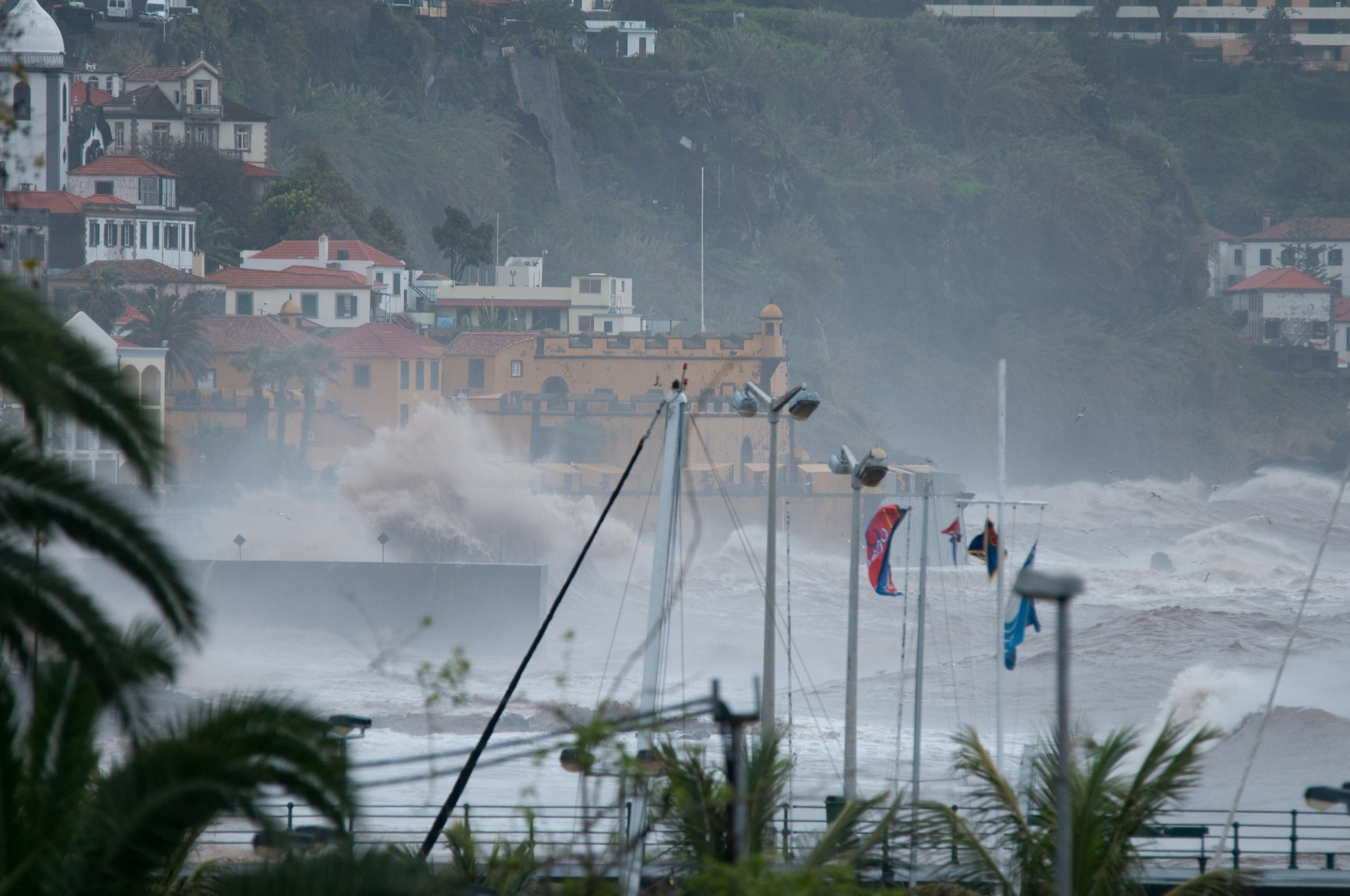 Madeira floods and mudslides - View from Avenida do Mar towards Forte de São Tiago